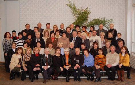 Працівники НТ НМетАУ: П едагогічний колектив Нікопольського технікуму НМетАУ